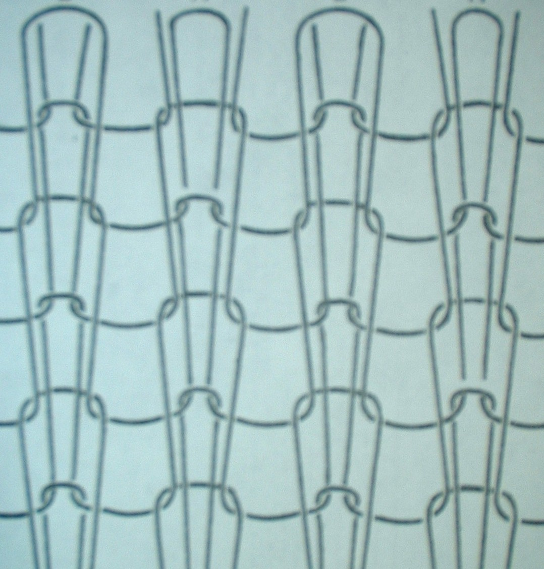 Interlock-Grundbindung